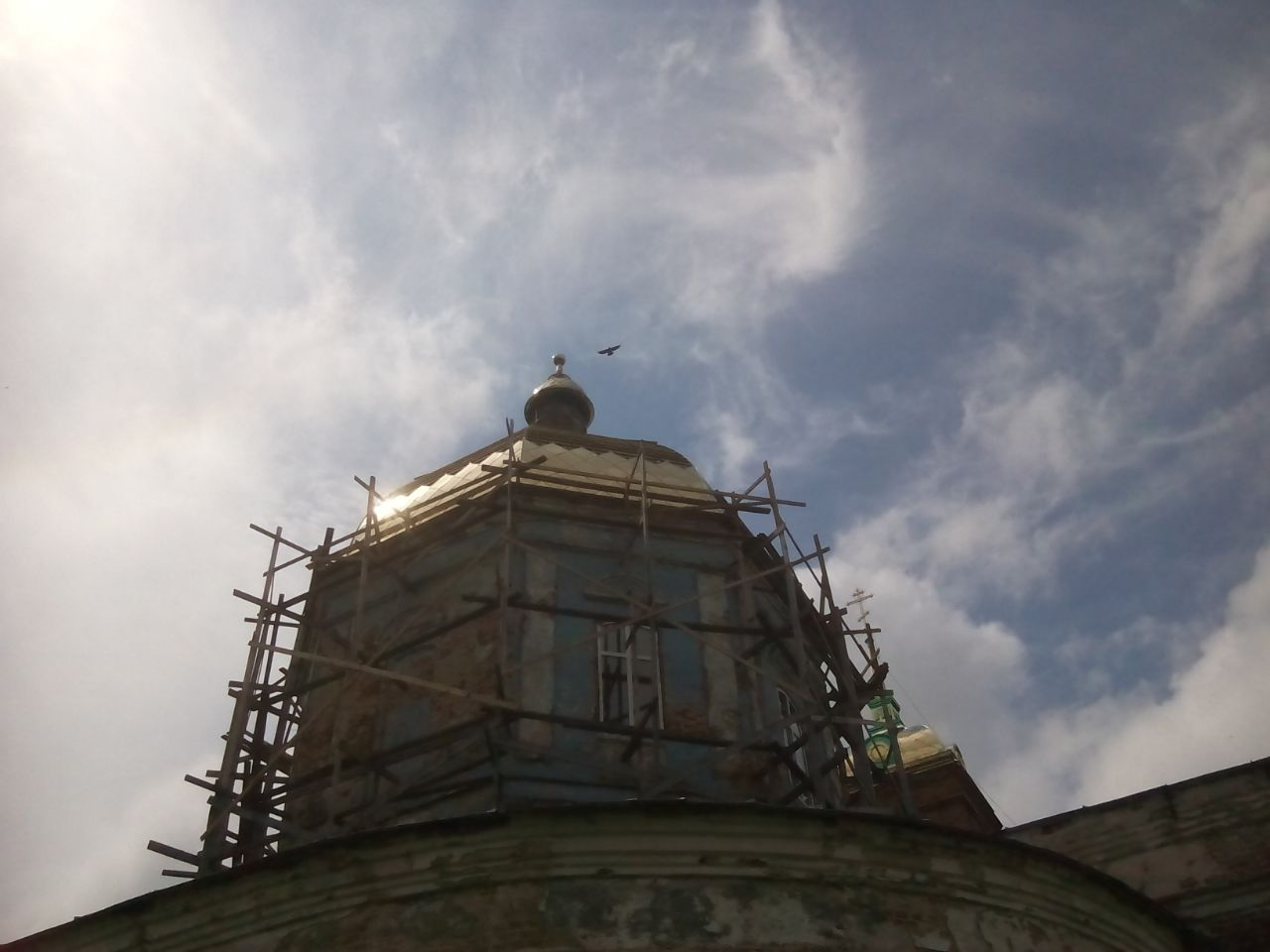 Церковь Святой Живоначальной Троицы восстановление купола